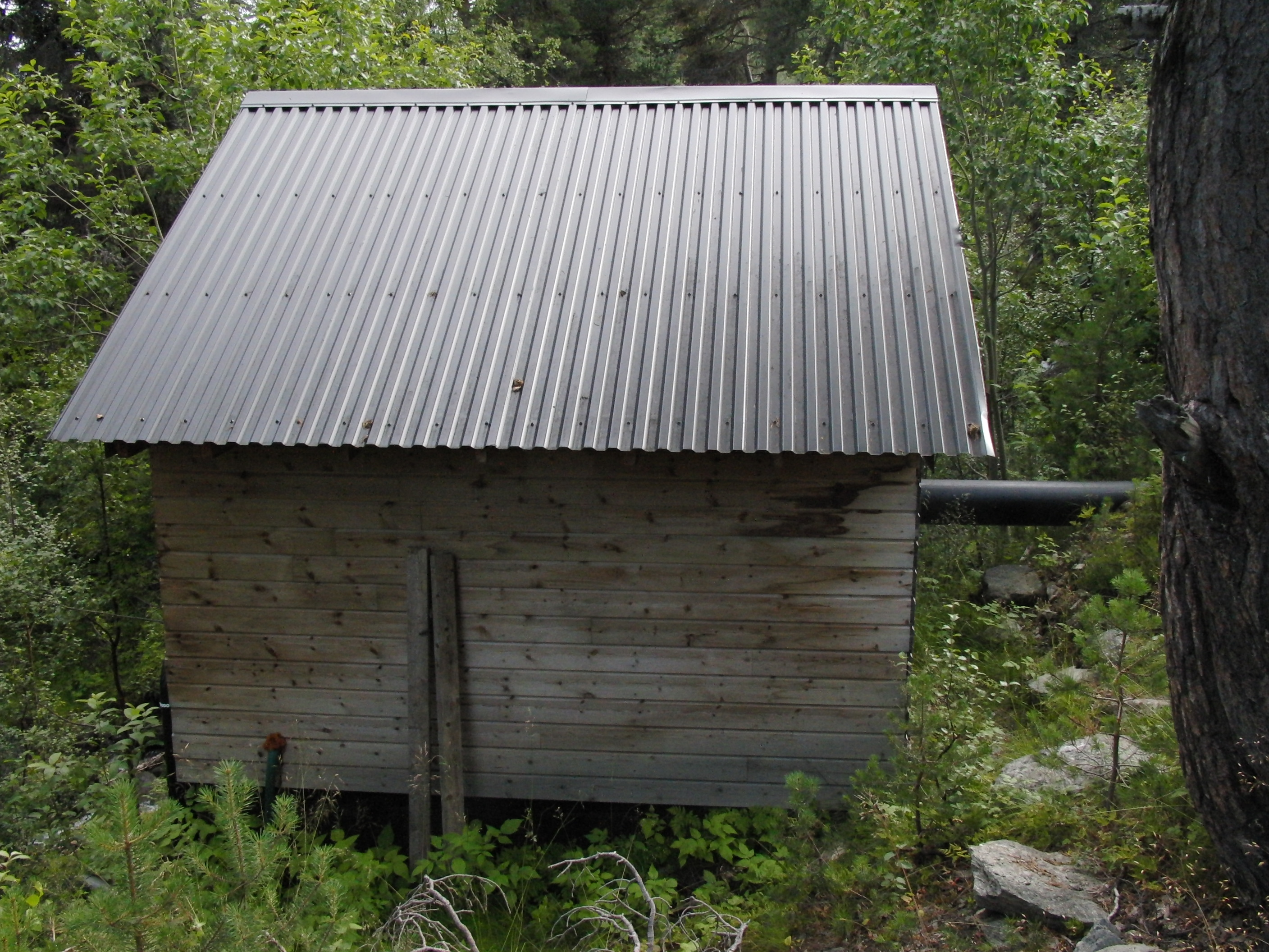 Harastølen I minikraftverk